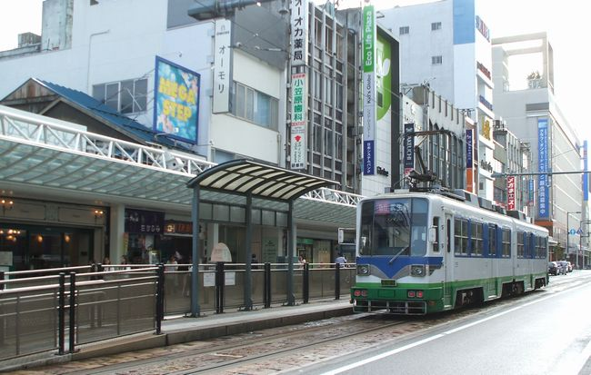 Fukui-Ekimae Station